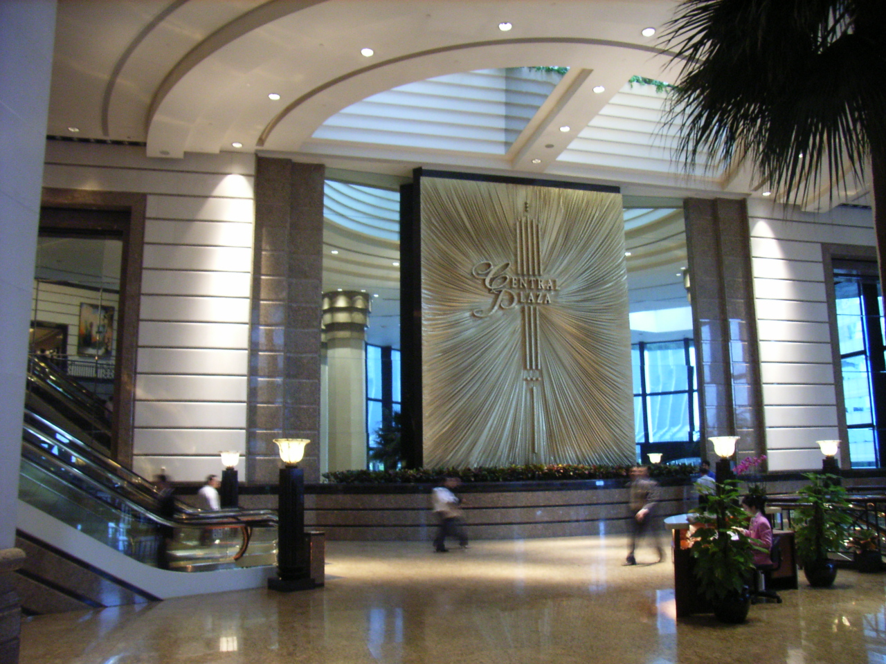 中環廣場 HK Central Plaza 位於香港灣仔